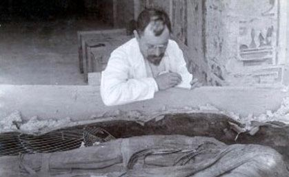 Victor Loret (1859-1946) lors d'une fouille en Egypte.